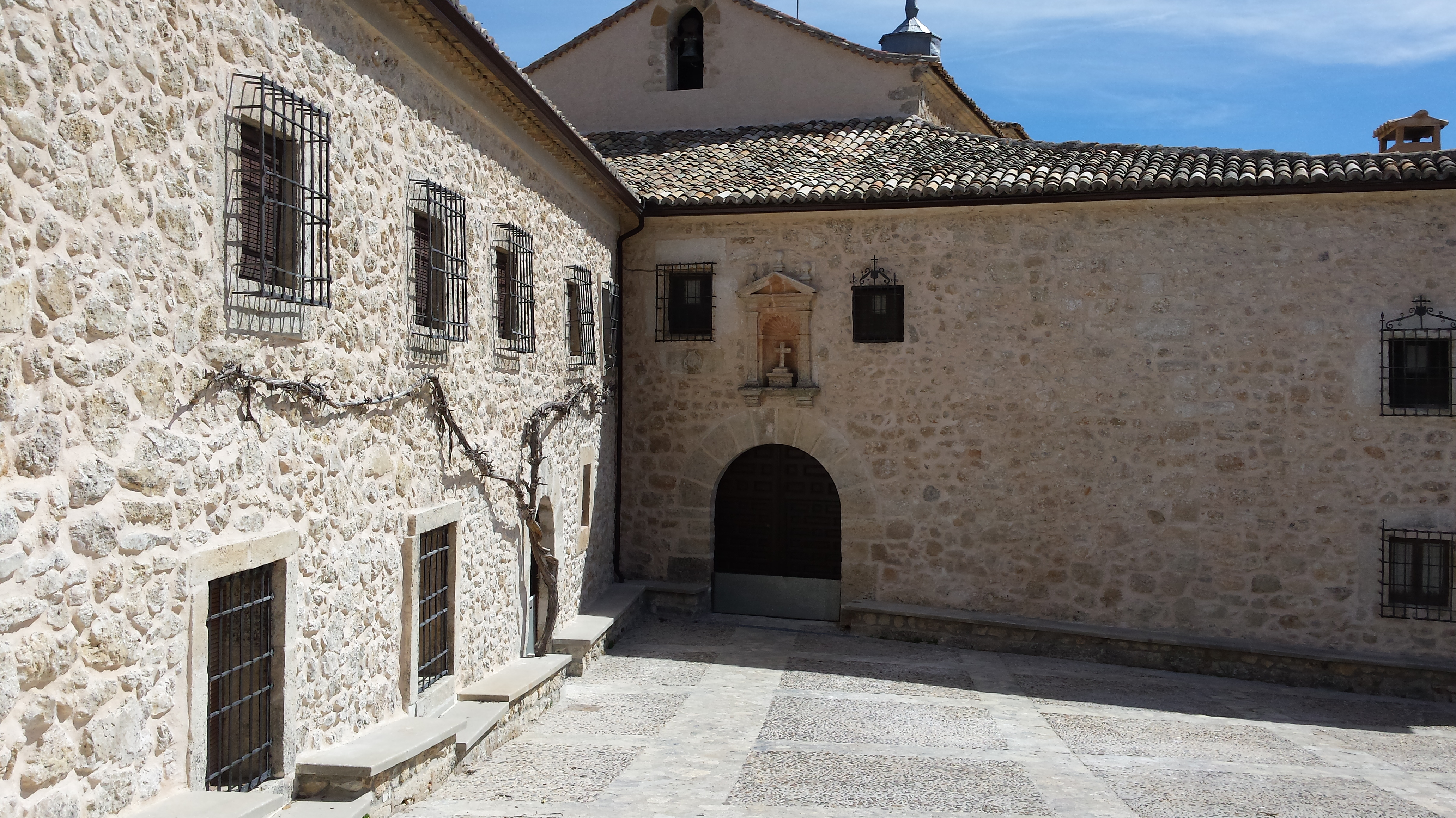 Auñón ermita del Madroñal